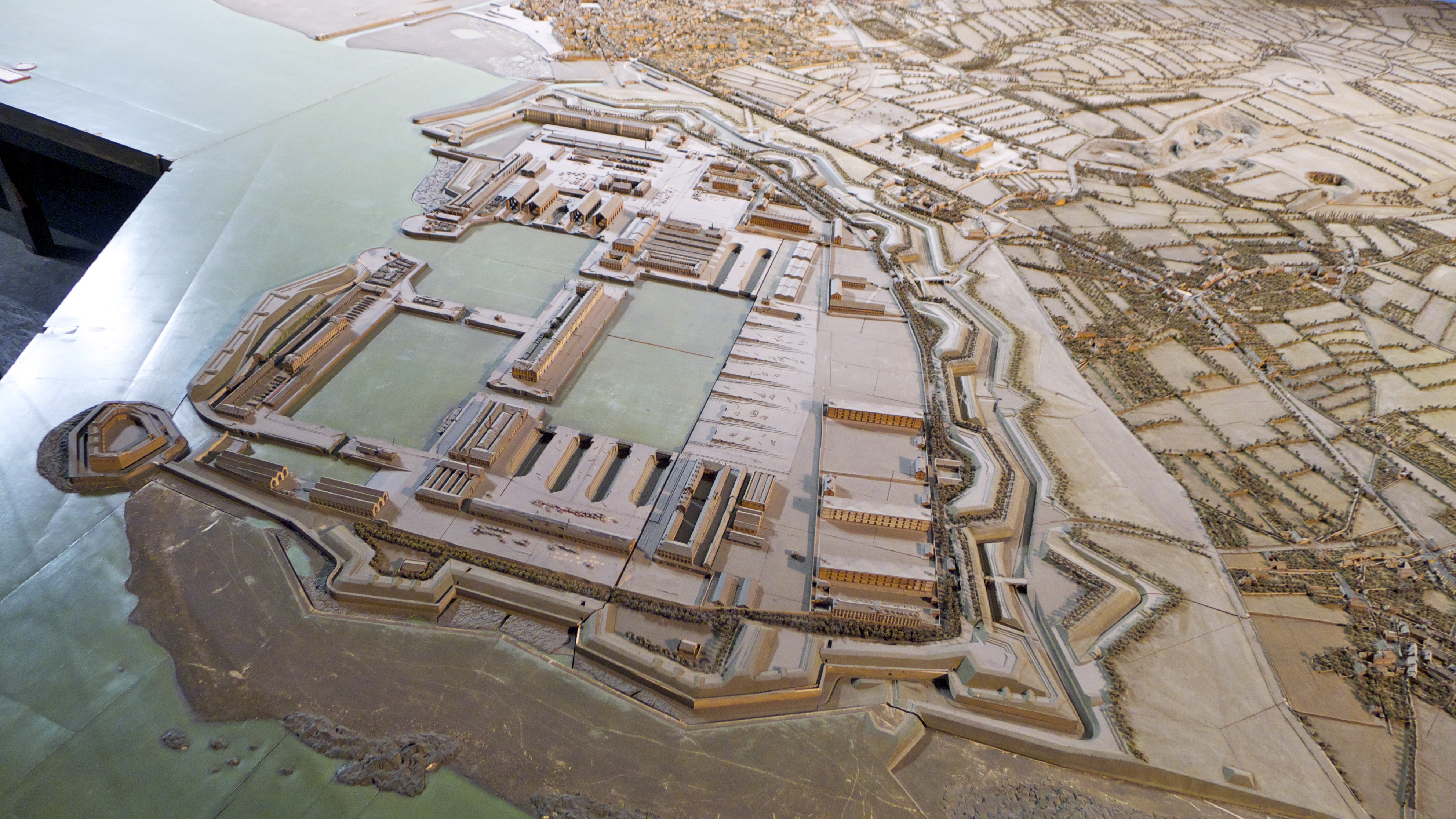 Détail du plan-relief du port de Cherbourg : l'arsenal dans son état de 1872. Plan-relief construit de 1813 à 1819 et actualisé de 1863 à 1872. Échelle 1/600e.